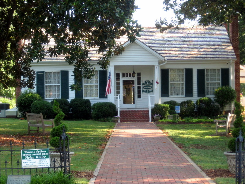 Ivy Green, childhood Home of Helen Keller.